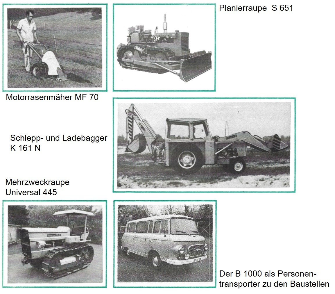 Maschinentechnik im Landschaftsbau der DDR 1985